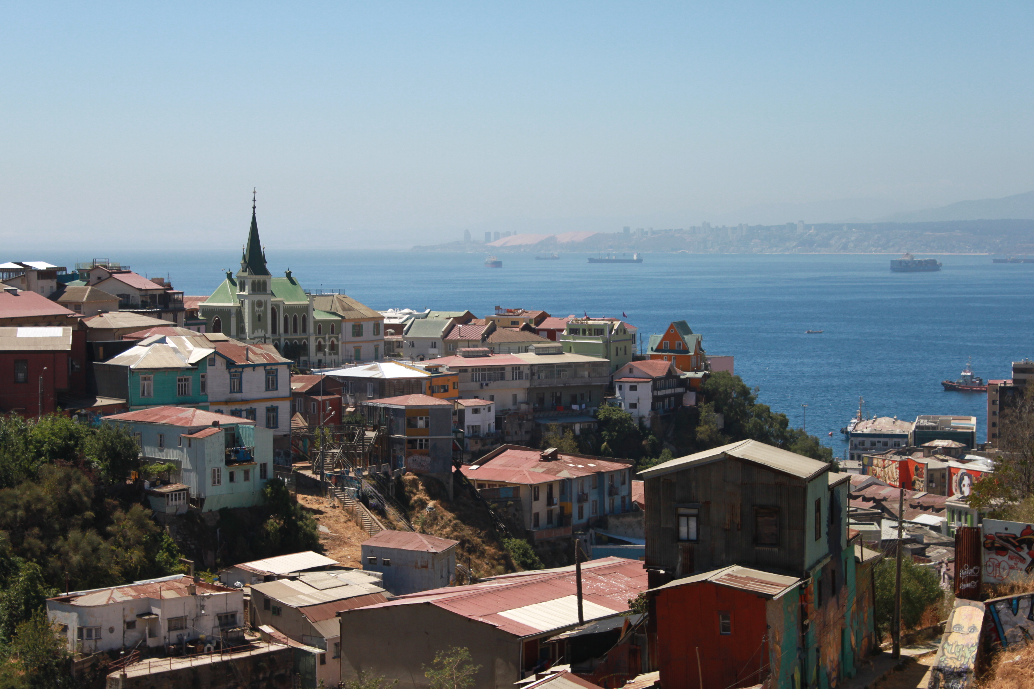 Vista del puerto desde el Centro Cultural Parque Cultural Valparaíso, Chile